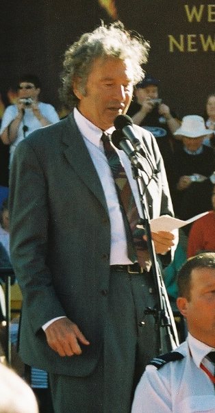 New Line Cinema CEO Robert Shaye bei der Weltpremiere des dritten Teils des Herrn der Ringe in Wellington (Neuseeland)